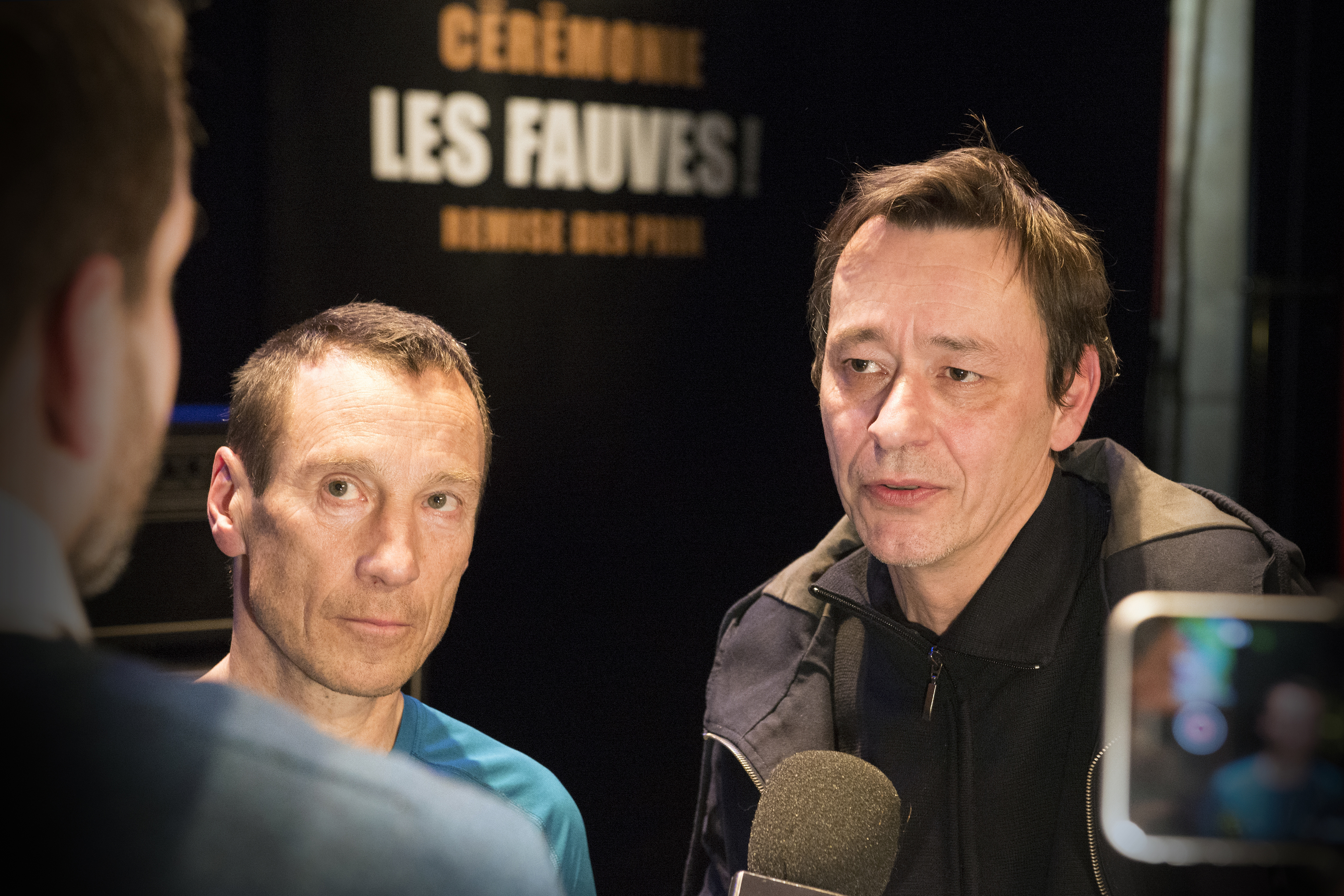 Philippe de Pierpont et Éric Lambé, récipiendaires du Fauve d'or du meilleur album au Festival International de la Bande Dessinée d'Angoulême 2017.